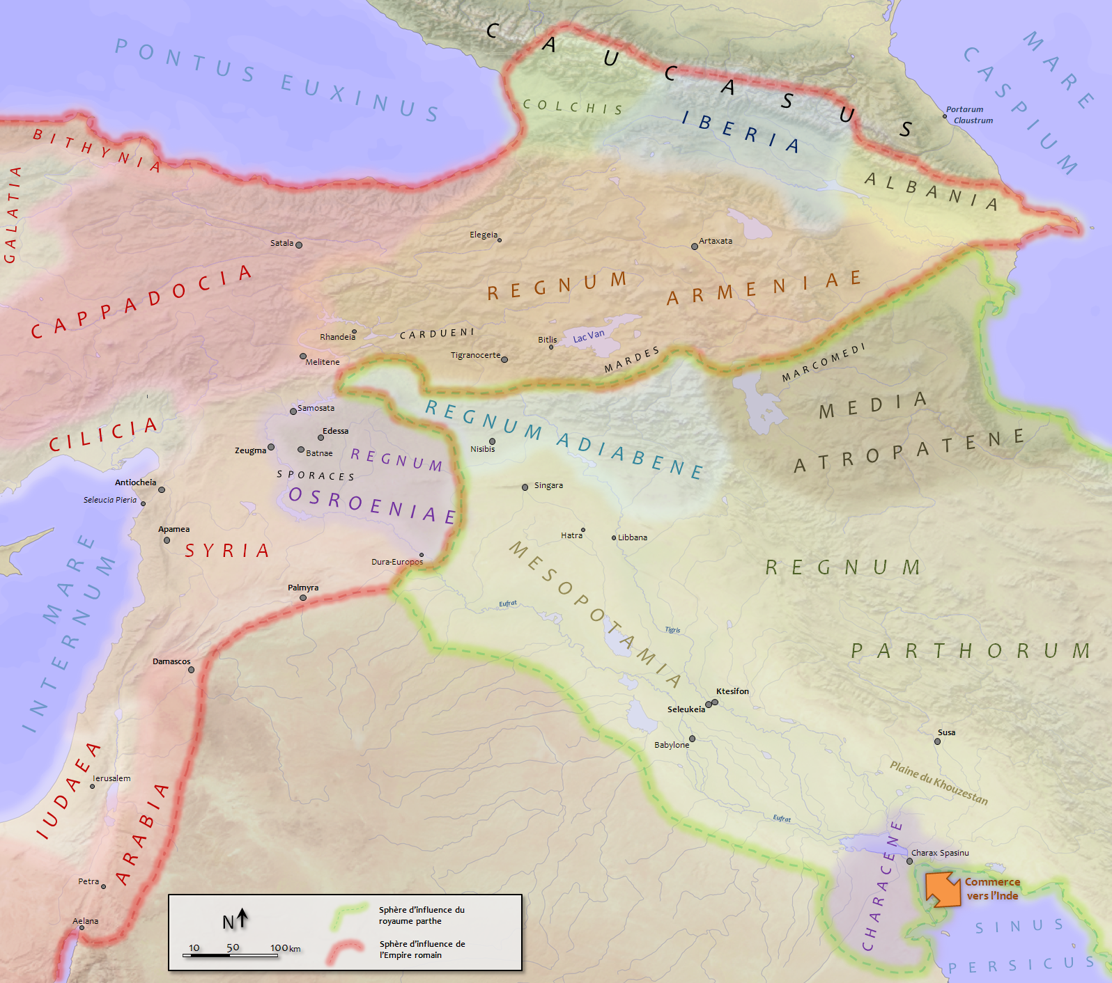 Carte centrée sur l'Arménie et la Mésopotamie. Situation en Orient vers 110 ap. J.-C. avant la guerre parthique de Trajan.